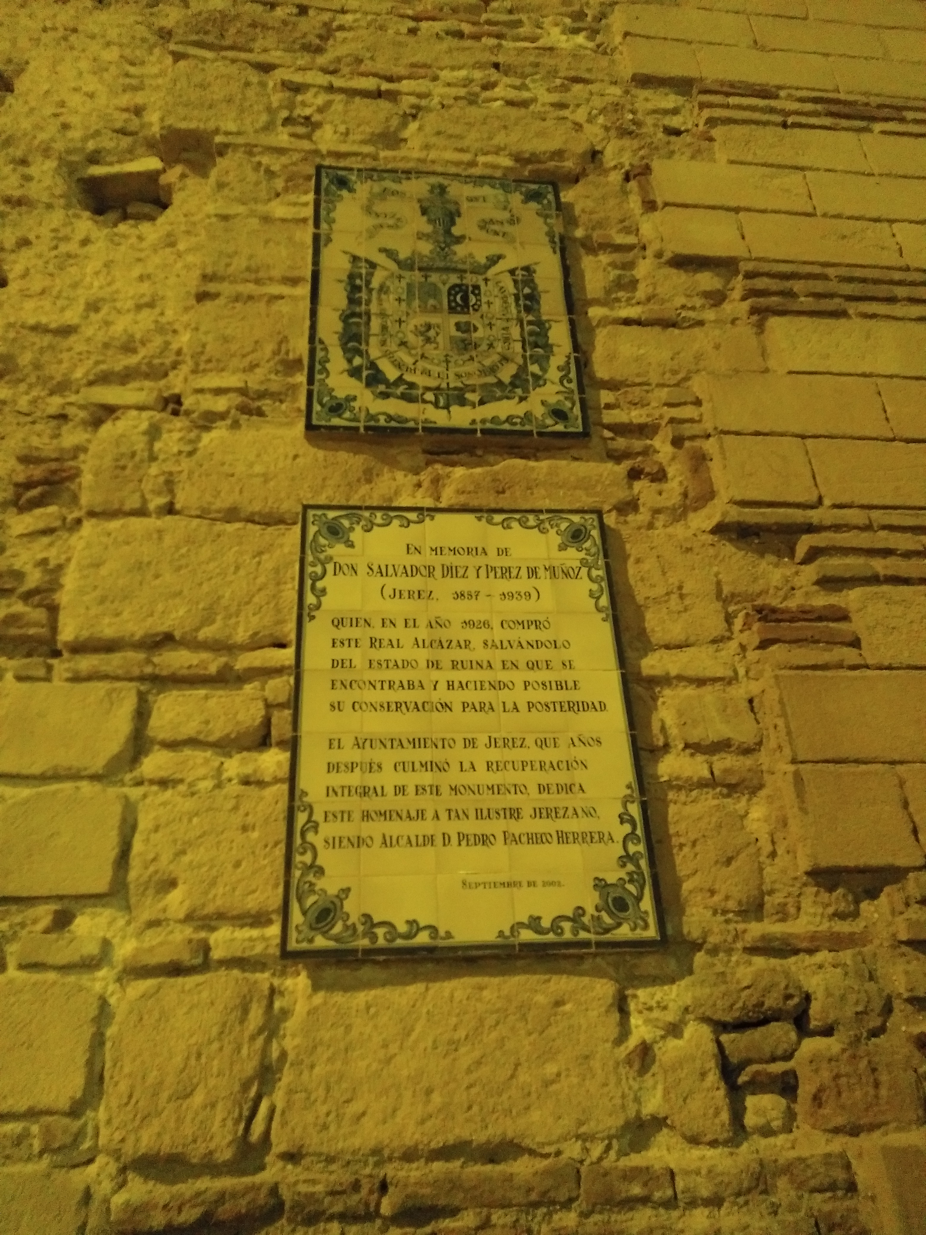 placa en honor de Salvador Díez y Pérez de Muñoz en el Alcázar de Jerez de la Frontera